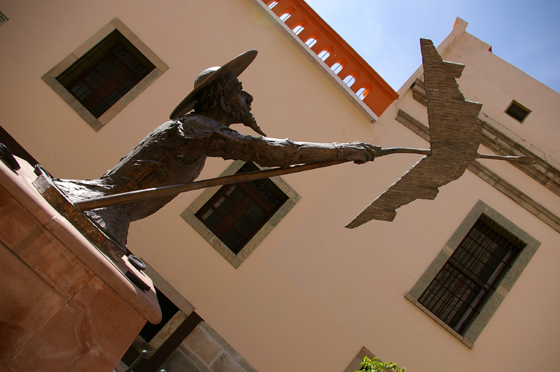 Guanajuato (city), Guanajuato.